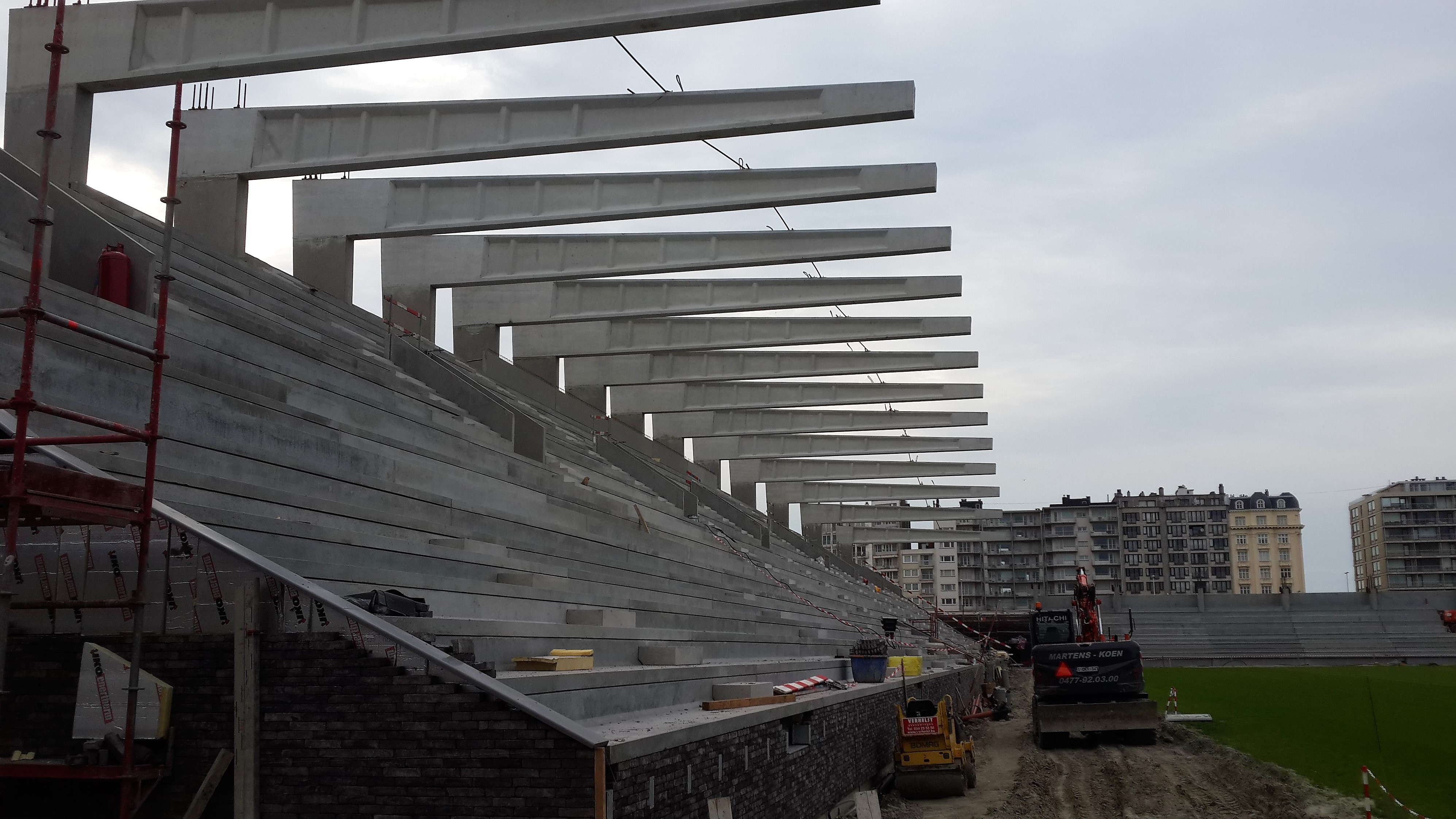 Versluys Arena (Mariakerke, Oostende) in opbouw